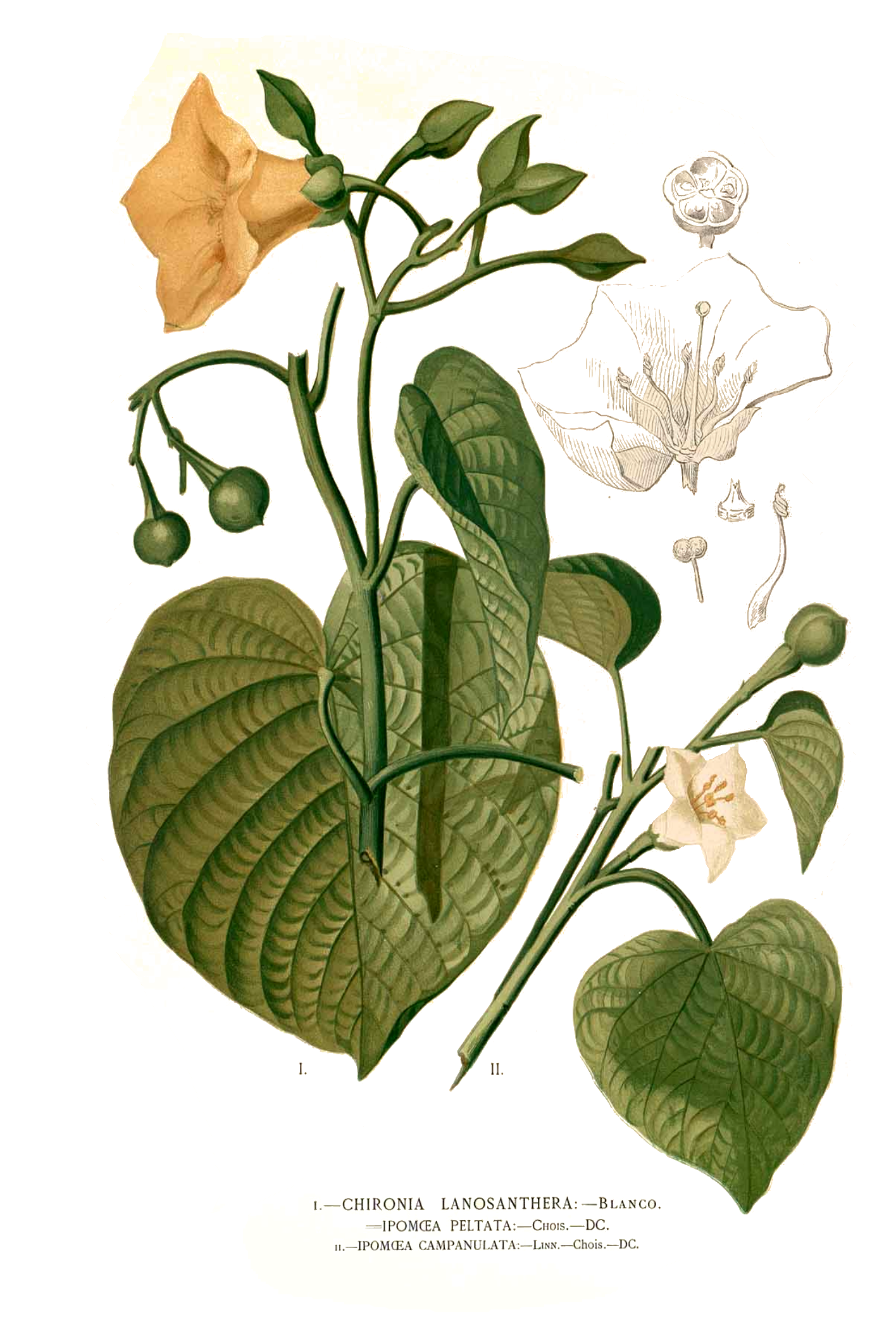 I: Merremia peltata (L.) Merr. II: Stictocardia campanulata (L.) Merr., 1914. Plate from book